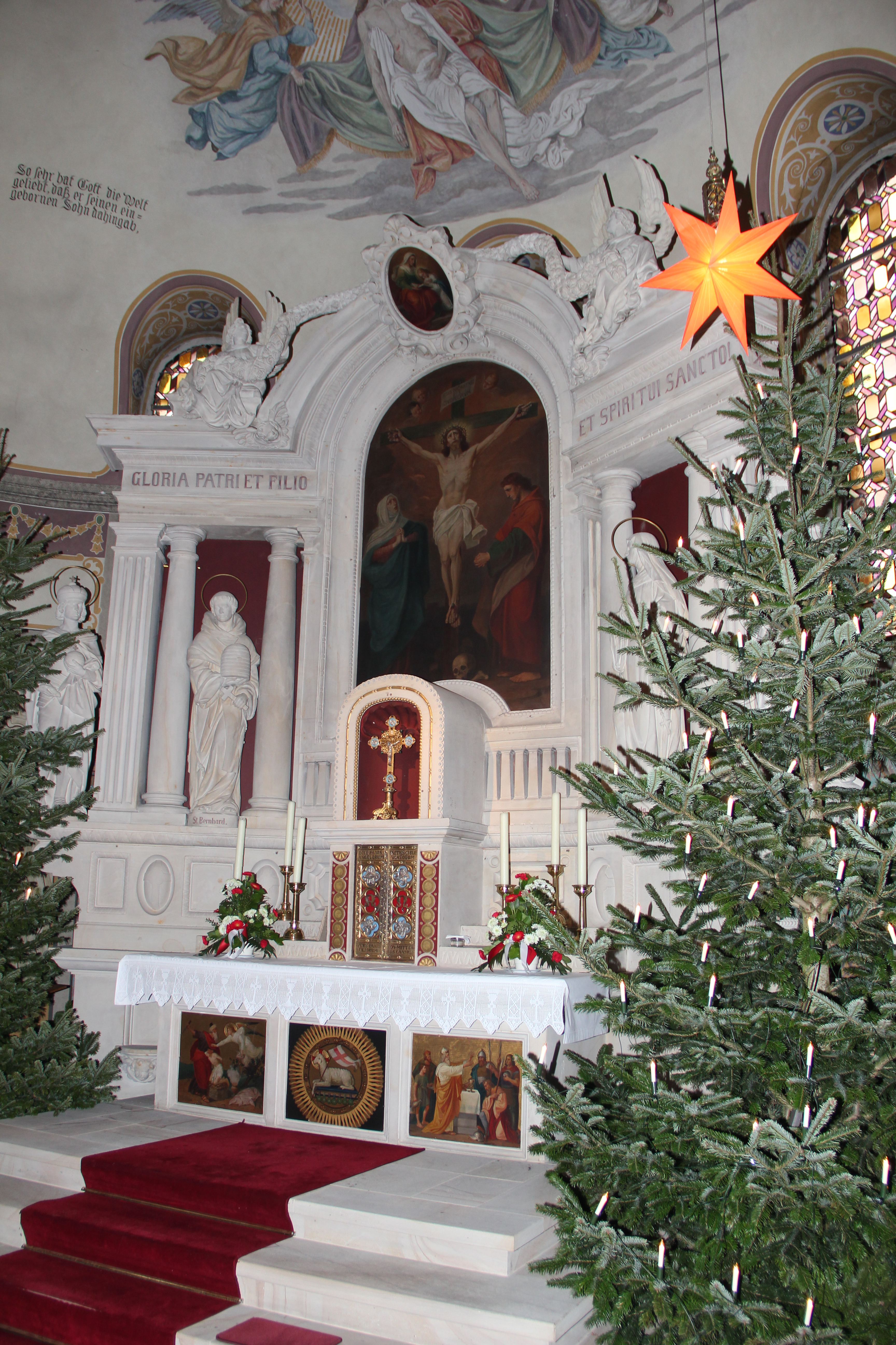 Hochaltar der Kirche St. Cäcilia in Bösel zur Weihnachtszeit